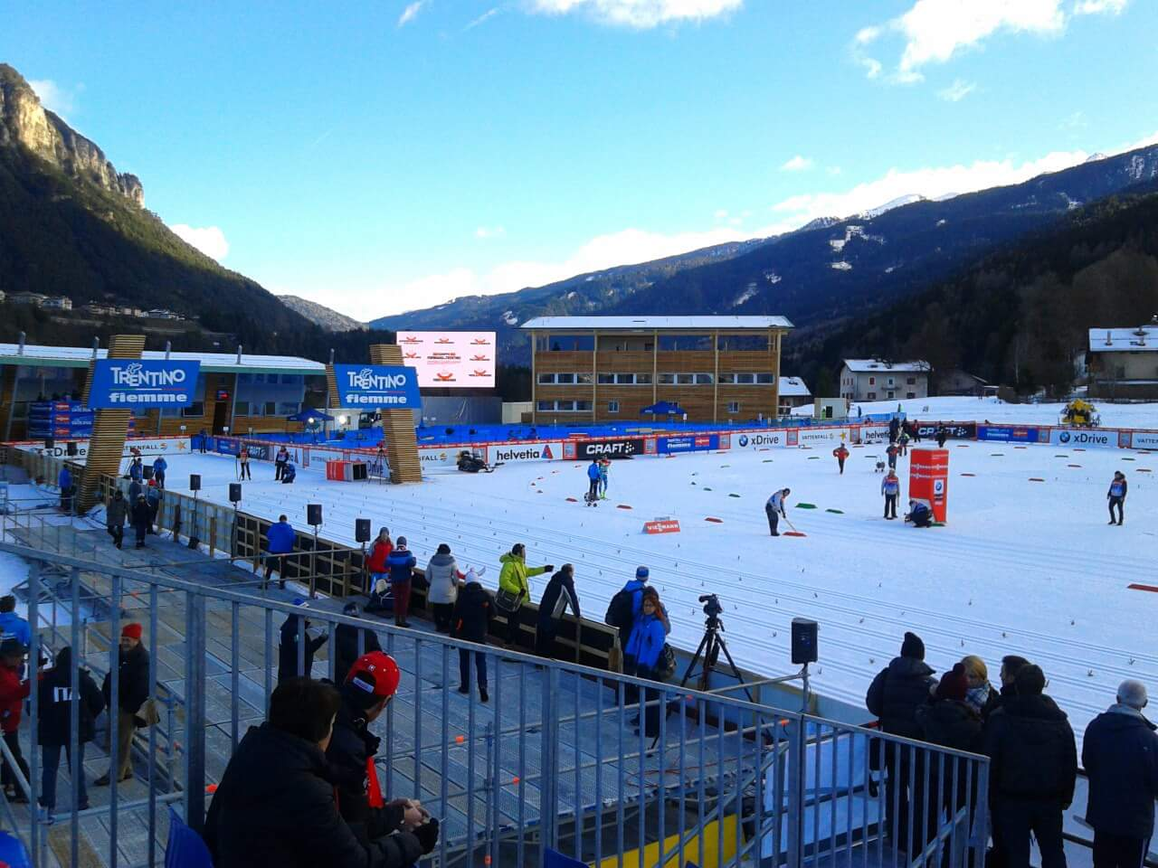 Preparazione della pista dello Stadio del fondo di Lago di Tesero (Val di Fiemme, Trento) in occasione del Tour de Ski 2013